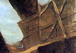 Firma de Asensio Juliá ("Juliā") en el cuadro (El Náufrago.